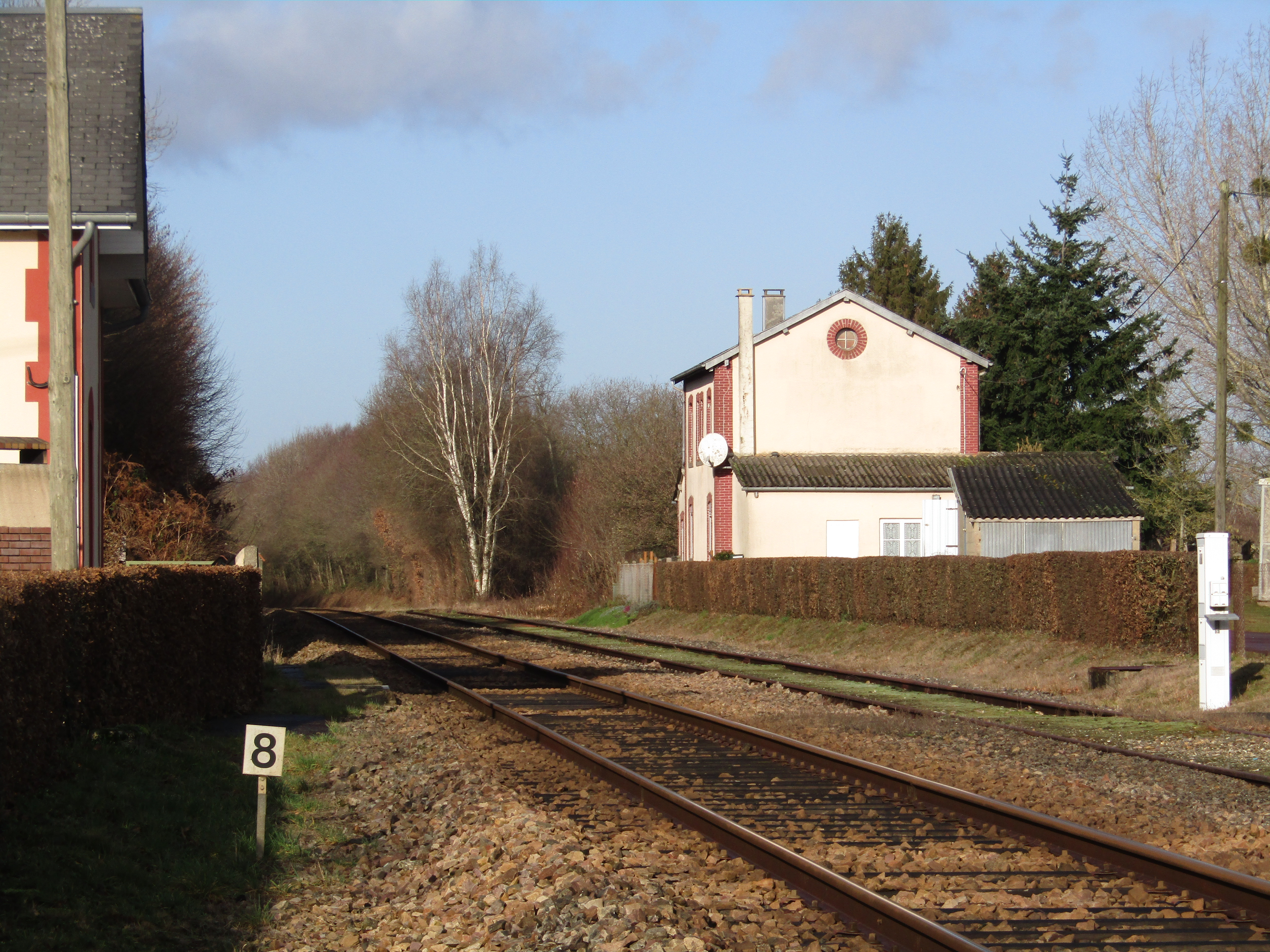 L'ancien bâtiment voyageurs de la gare de Cerisy-Belle-Étoile en 2019